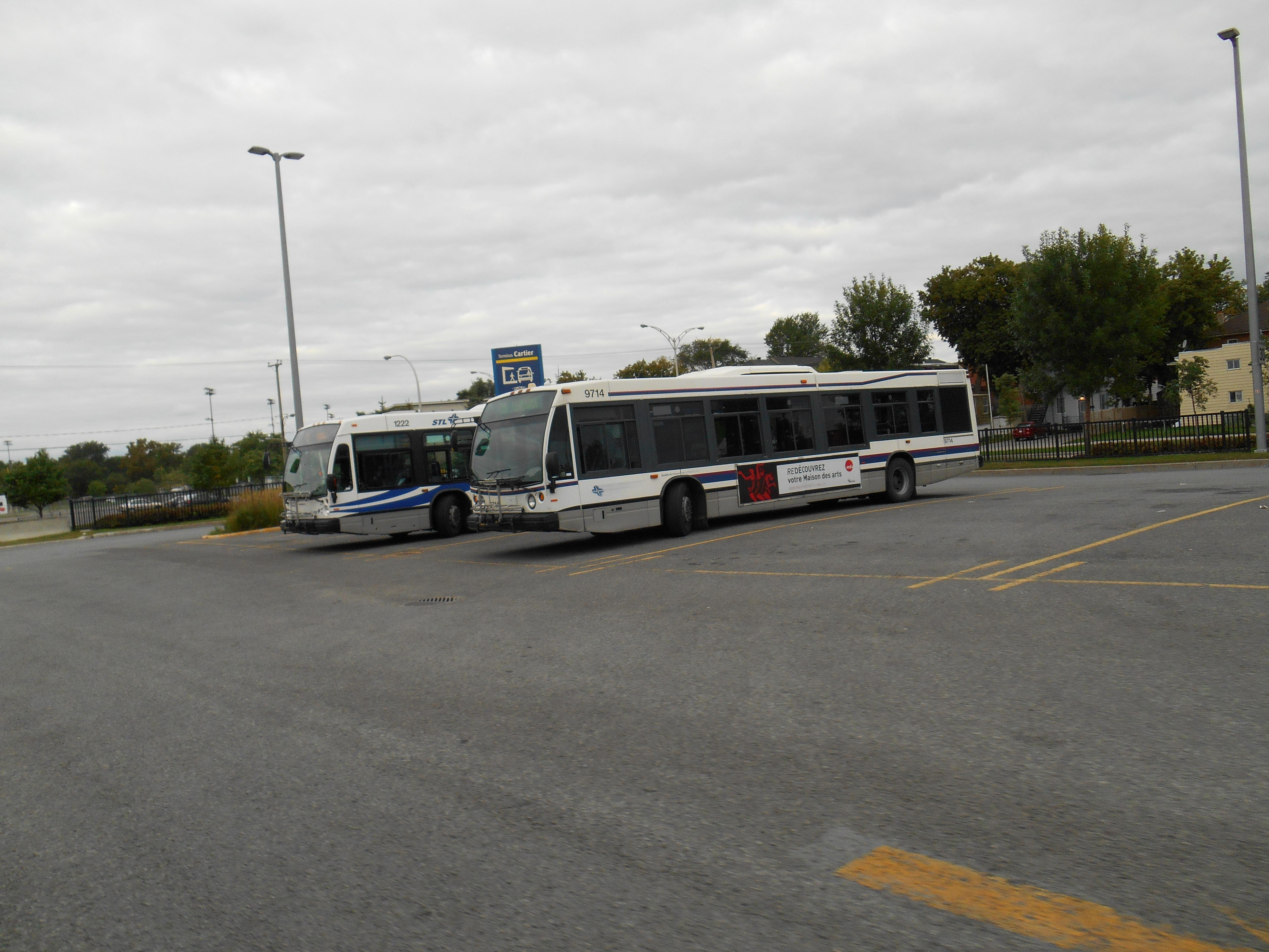 Autobus de Laval au terminus Cartier